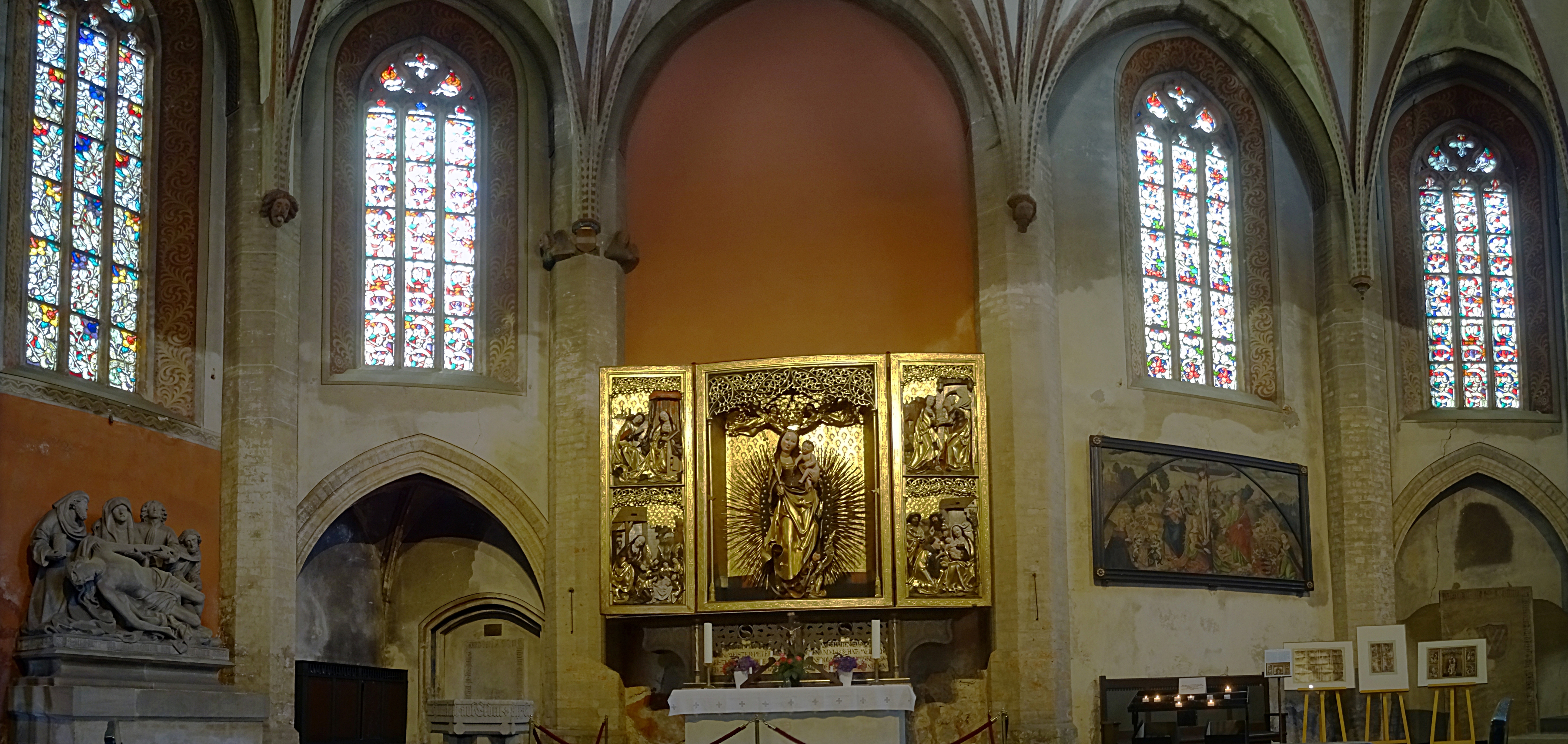 Panorama der Barbarakapelle mit dem spätgotischen Altar der Goldenen Madonna (Marienaltar) von Jakob Beinhart um 1510 in der Dreifaltigkeitskirche (Görlitz)